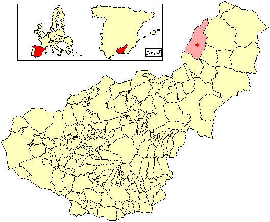 Situación de la localidad de Solana (en el municipio de Castril) respecto a la provincia de Granada, en España.